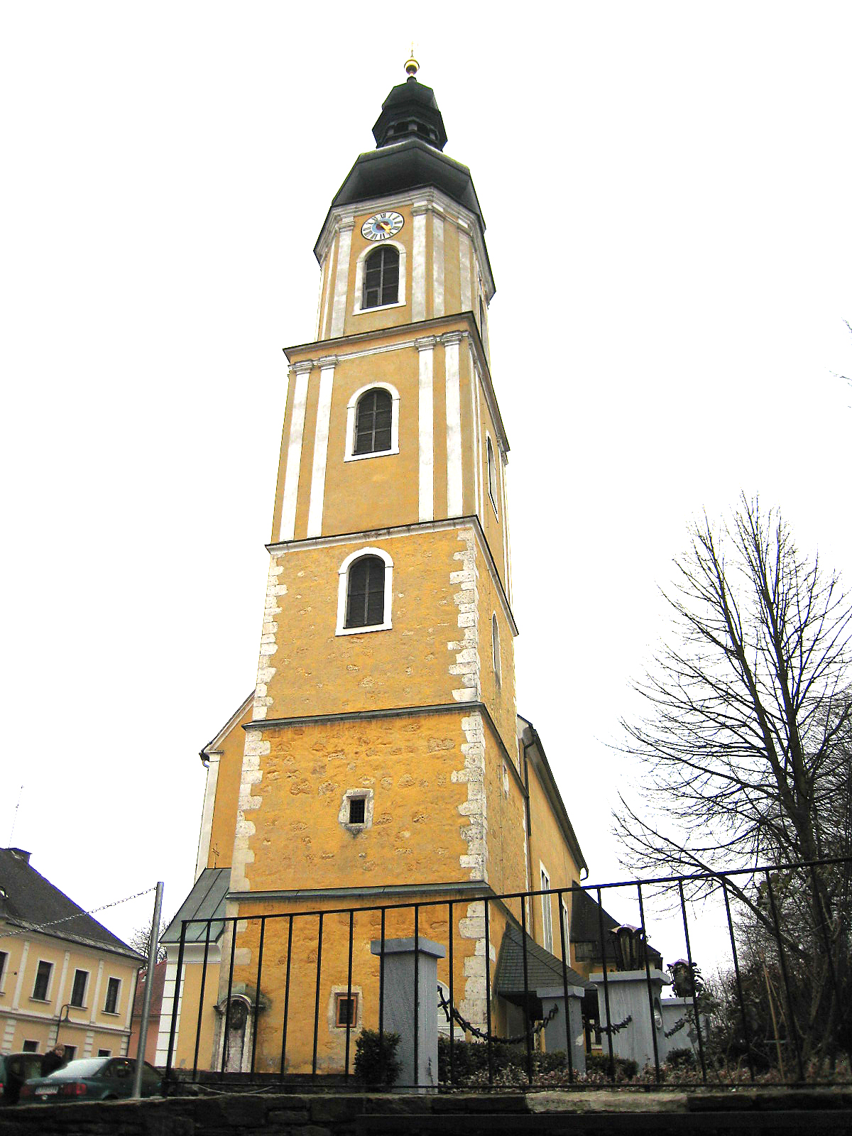 Kath. Pfarrkirche hl. Magdalena